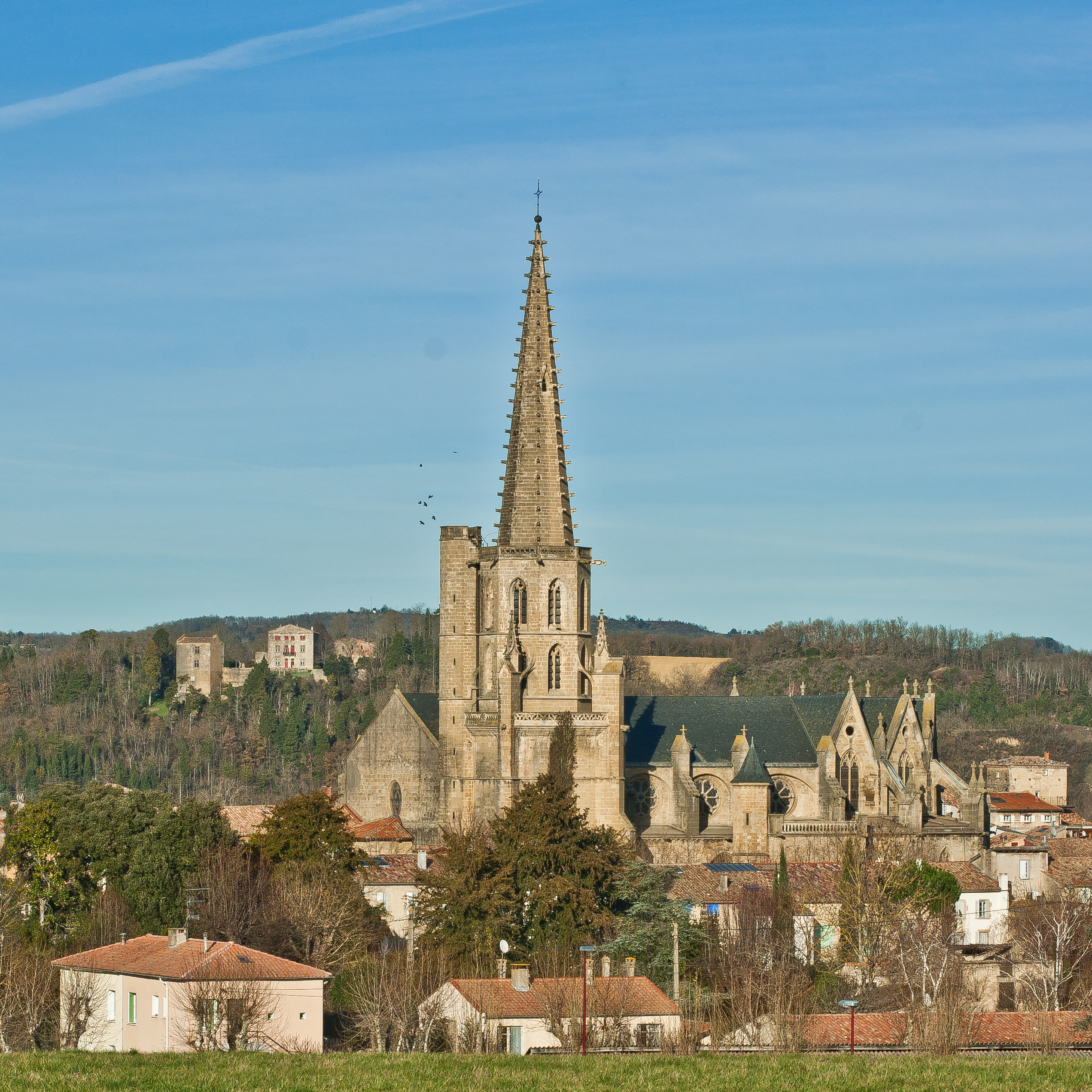 Vue de Mirepoix. La cathédrale, et à gauche, le château de Terride.